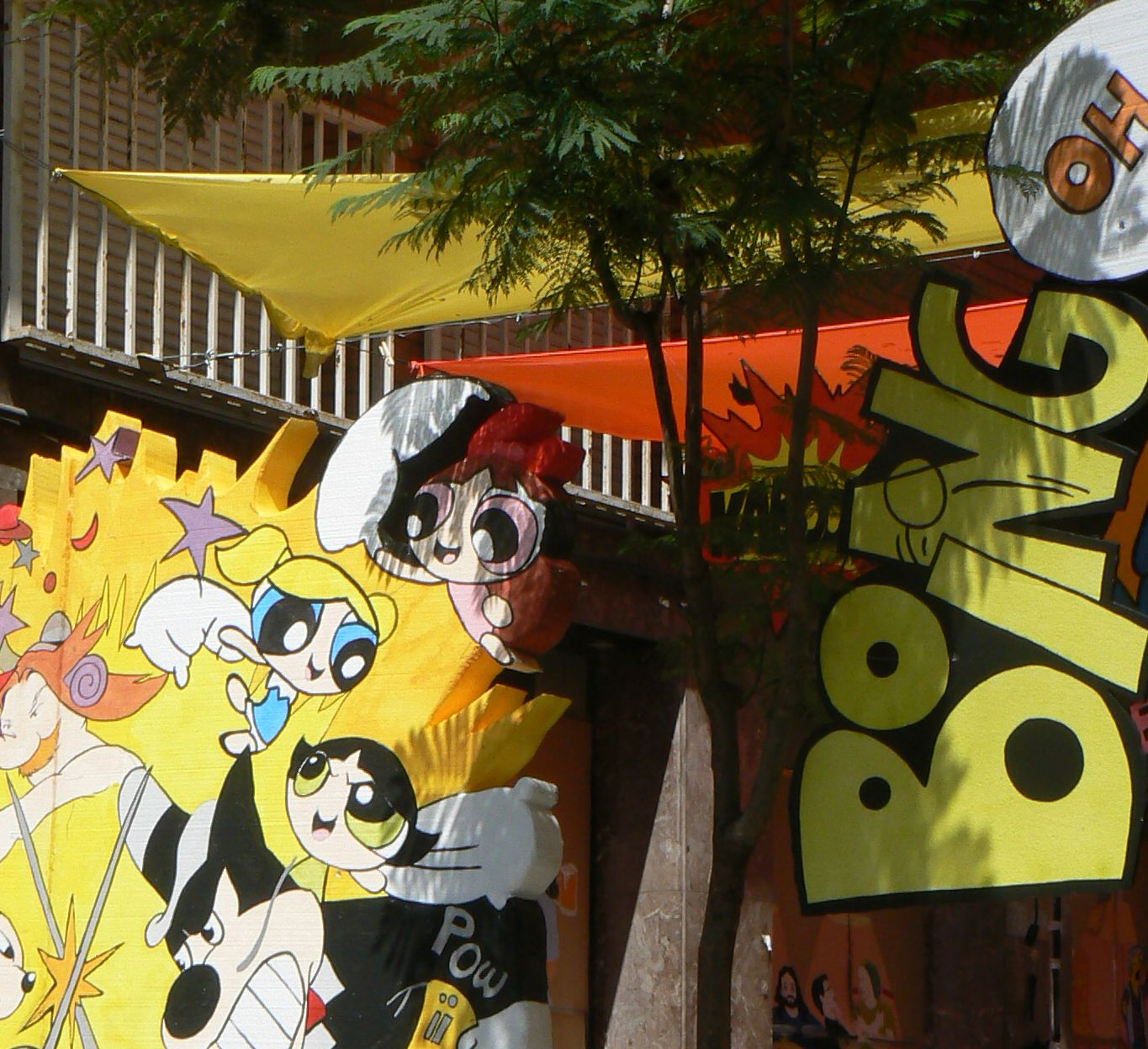 Detall de la decoració del carrer Bruniquer.